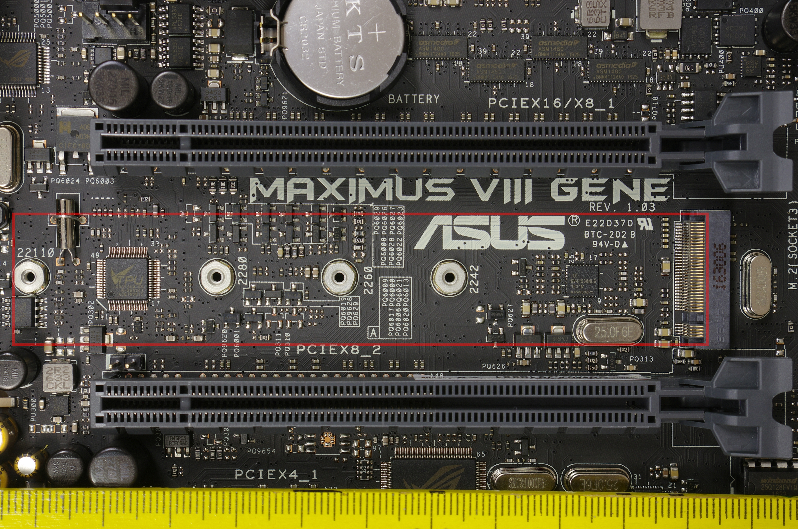 m.2 Steckplatz zwischen zwei PCIe*16 Slots angeordnet, unterstützt NVMe. Unterstützt 42mm, 60mm, 82mm und 110mm Karten. Mit Zentimetermaß